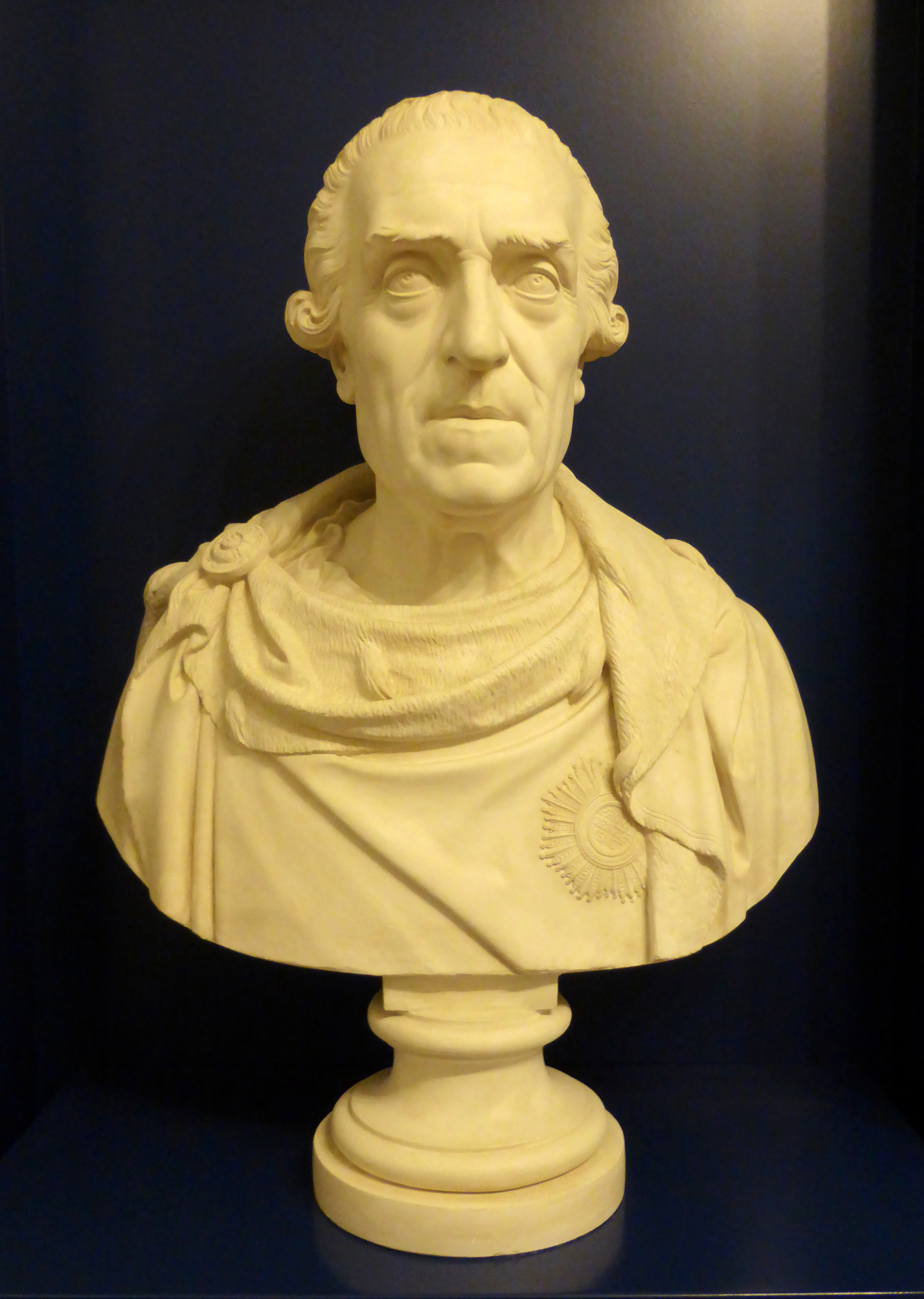 Büste von König Friedrich August I. von Sachsen aus Gips. Gefertigt vom Bildhauer Joseph Herrmann 1828. Ausgestellt im Militärhistorischen Museum Wolkenstein, Schloßplatz 4, Wolkenstein.